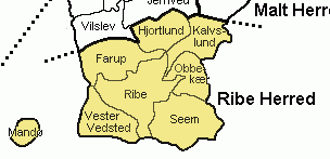 Ribe Herred Ribe Amt, Denmark Map by Svend-Erik Christiansen , edited by Nico-dk.